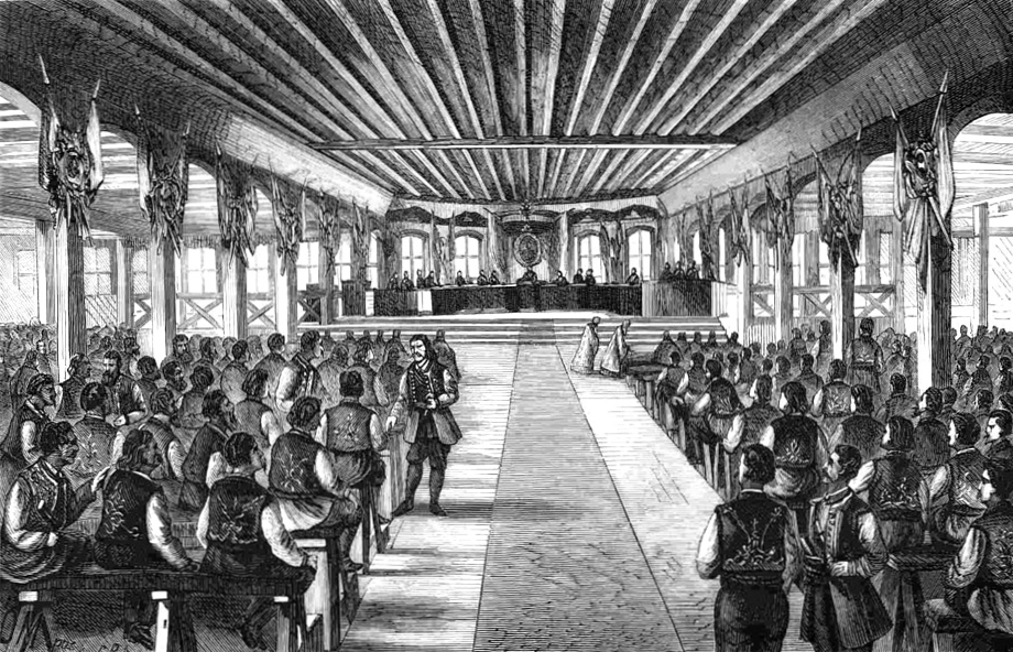 Болгария. Открытие заседаний народного собрания в Тырнове (Рис. и грав. О. Май). (1879 [1])